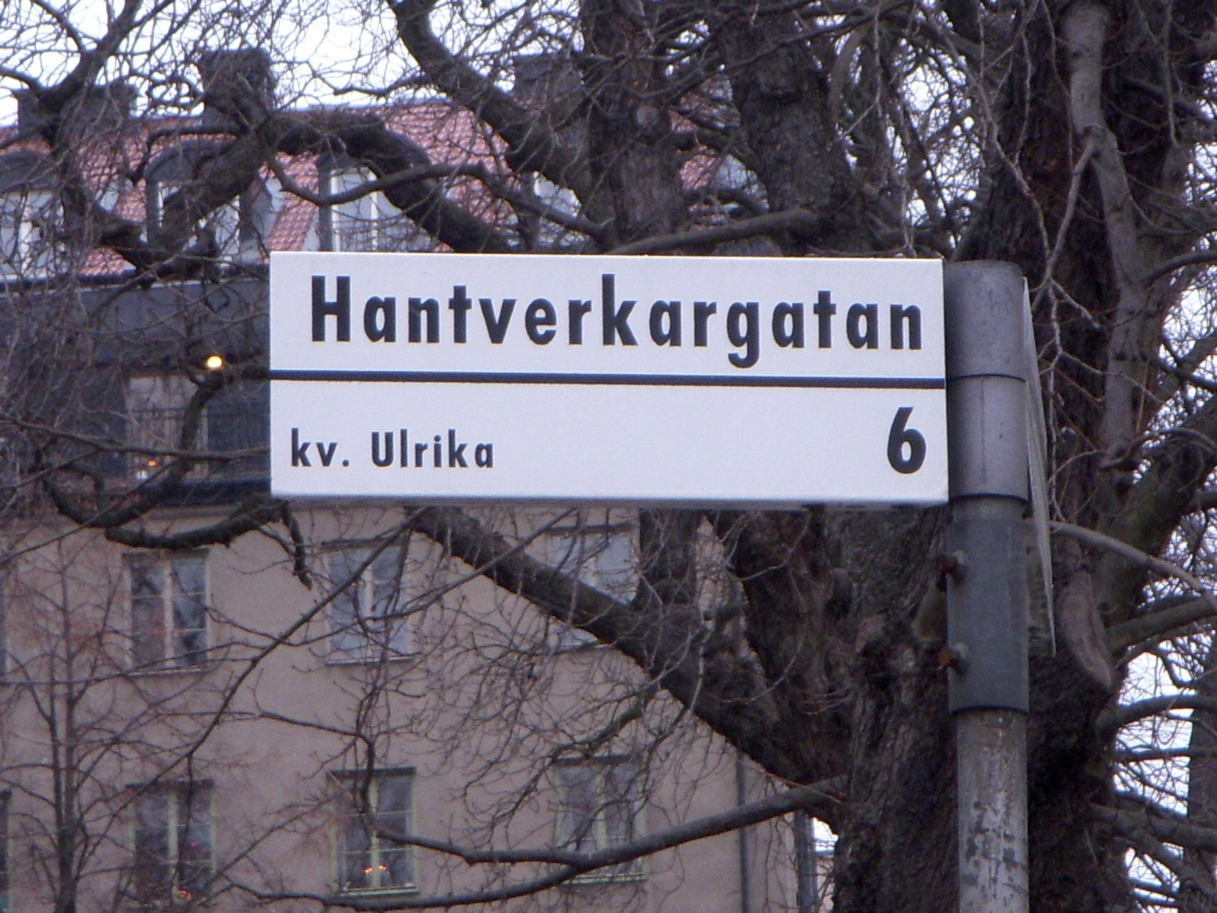 Gatuskylt, Hantverkargatan i Stockholm